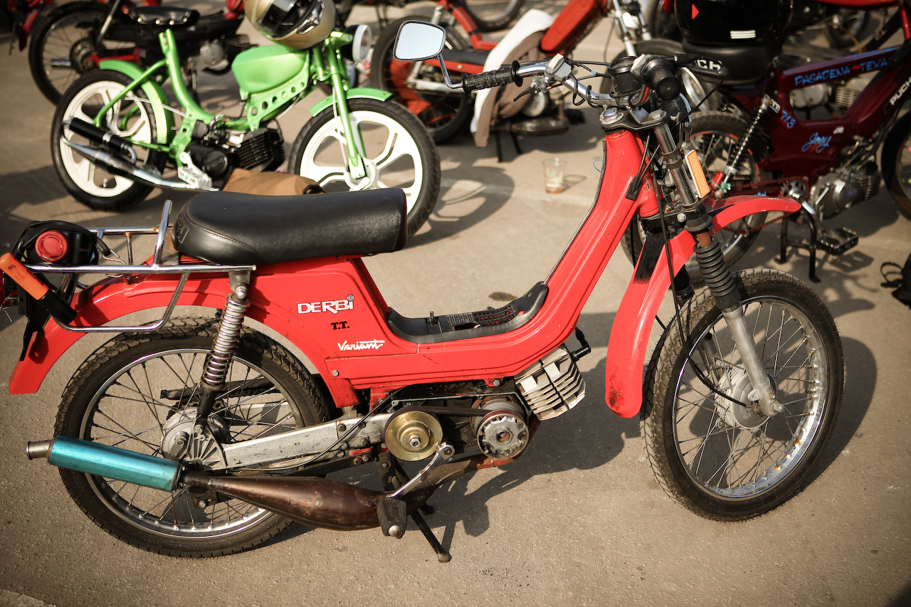 A customized Deri Variant